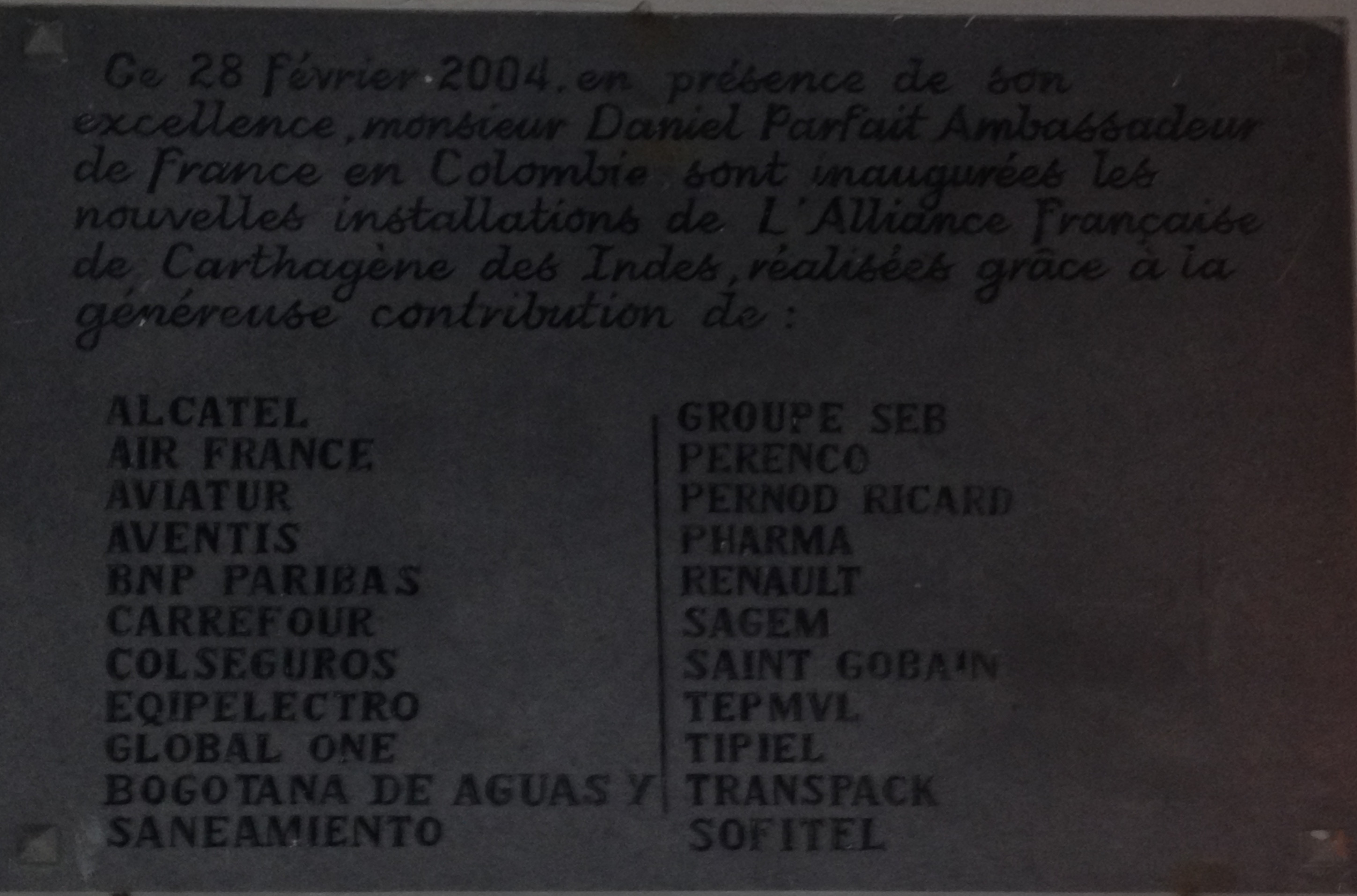 Plaque commémorative de la rénovation de l'Alliance francaise de Carthagène des Indes.